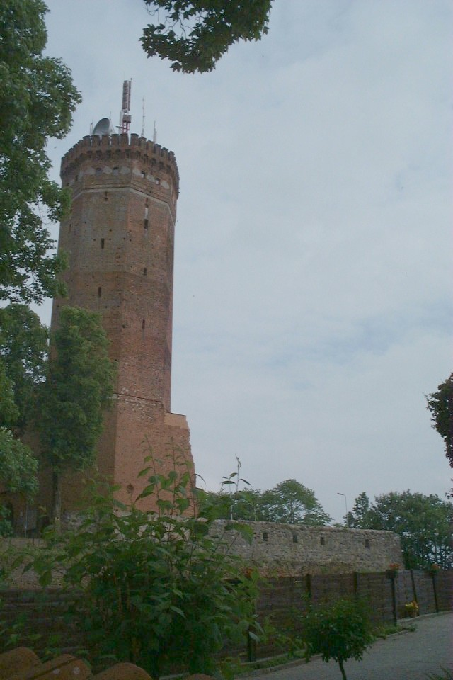 Poland Czluchów - castle tower.